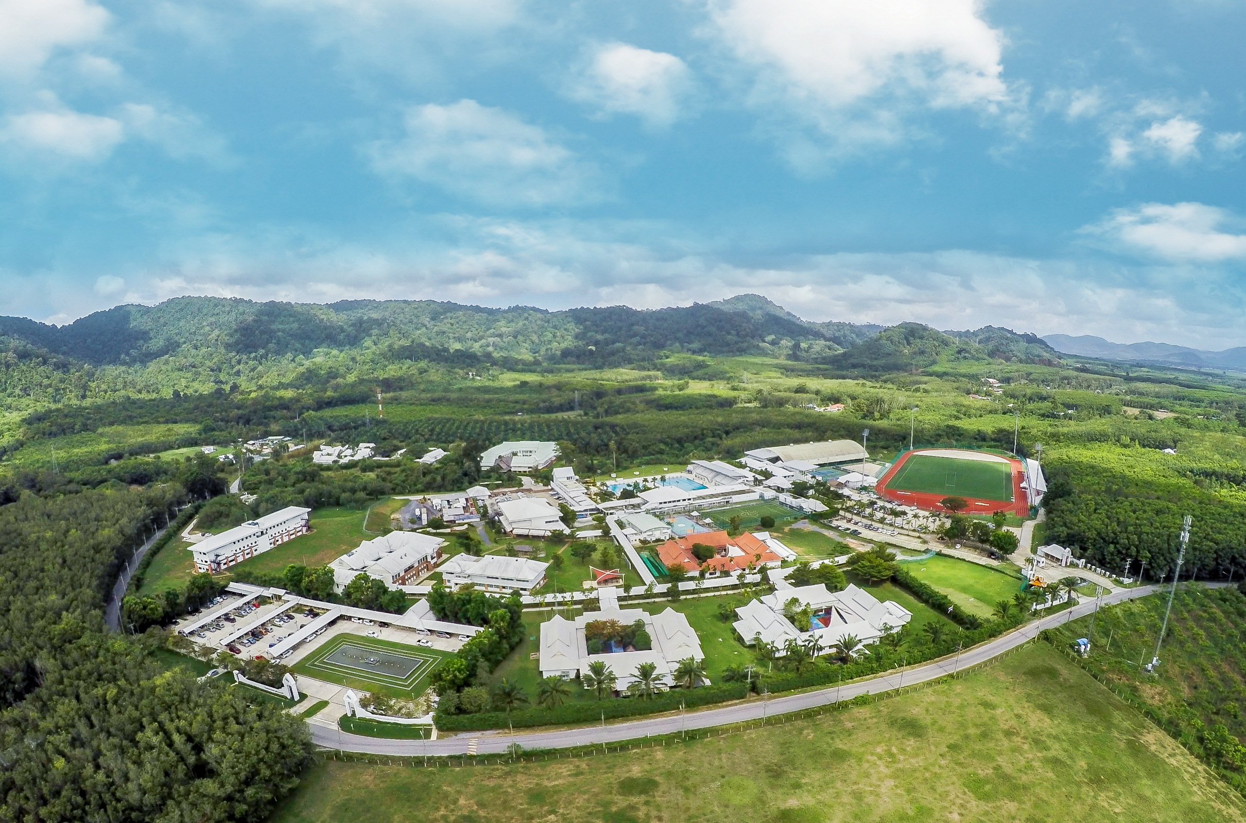 ธัญญปุระ รีสอร์ทเพื่อสุขภาพและกีฬา